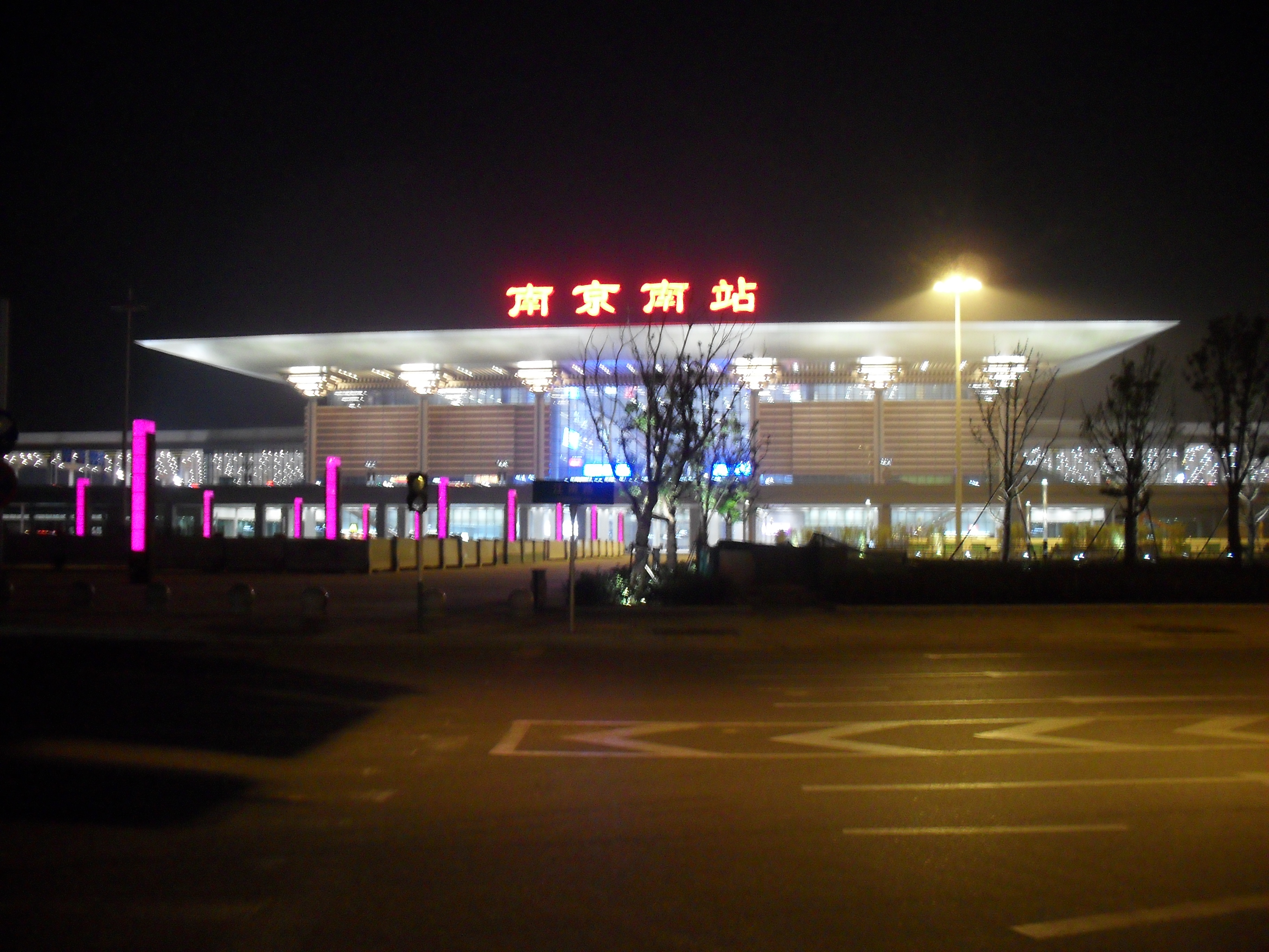 南京南站